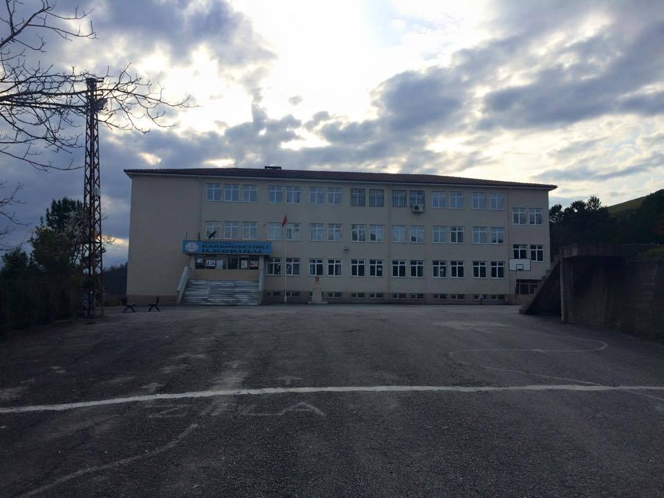 Okul